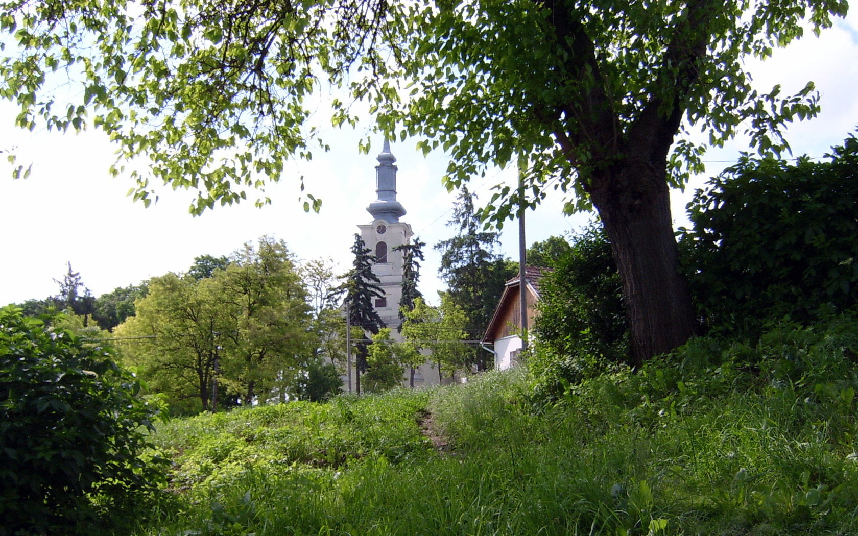 Kállói Szent Pál Megtérése római katolikus templom